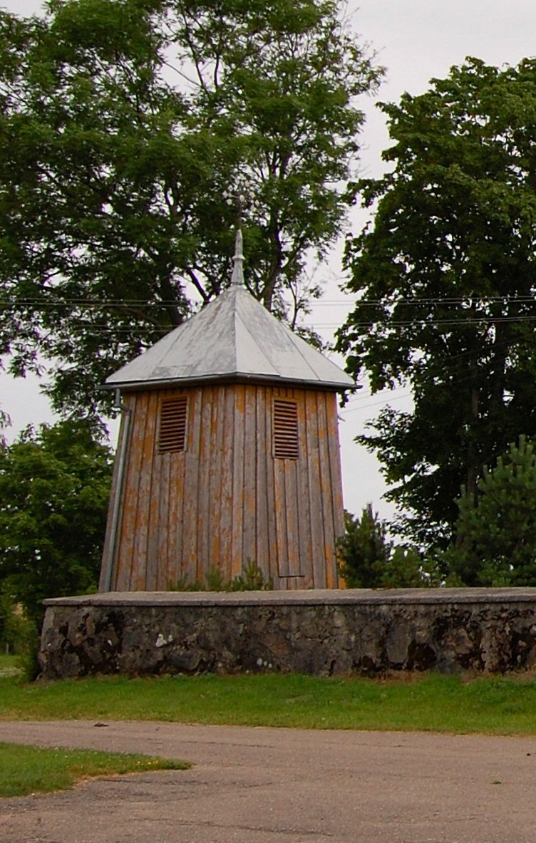 Degučių bažnyčios varpinė